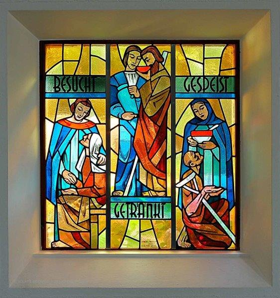 Besucht - Getränkt - Gespeist